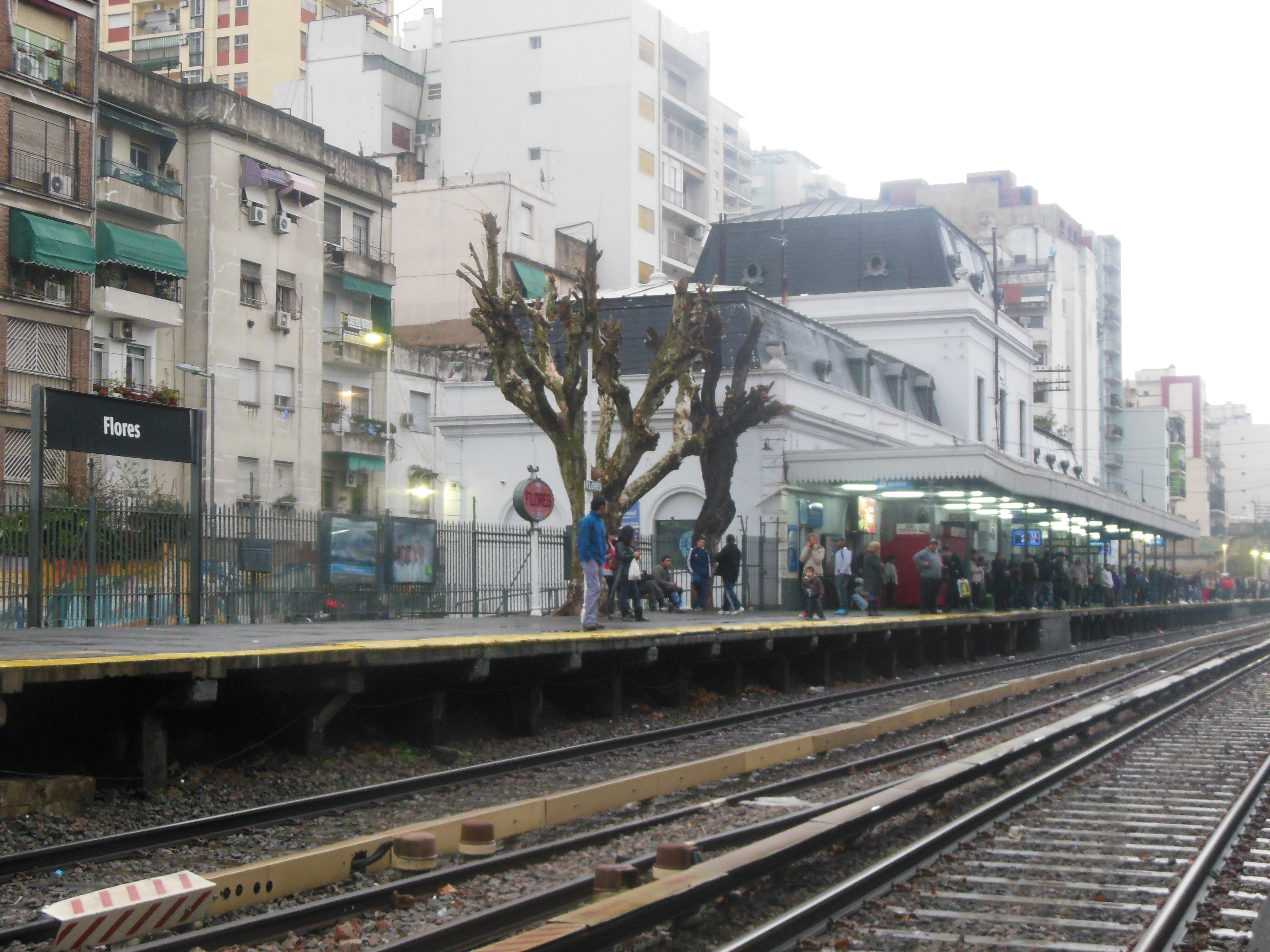 Panorama general de los andenes